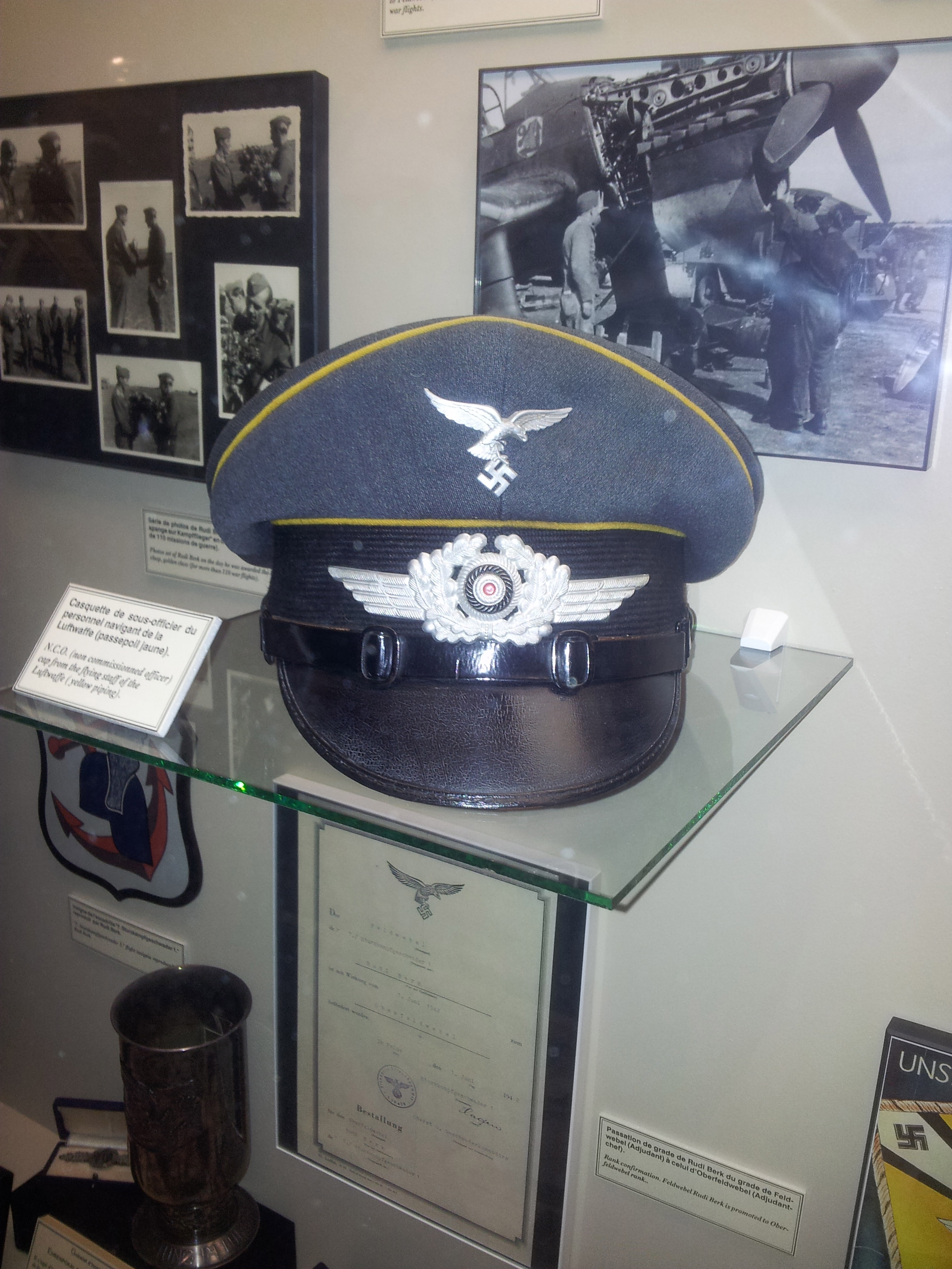 Casquette de sous-officier du personnel naviguant de la Luftwaffe. (passepoil jaune), durant la seconde guerre mondiale.